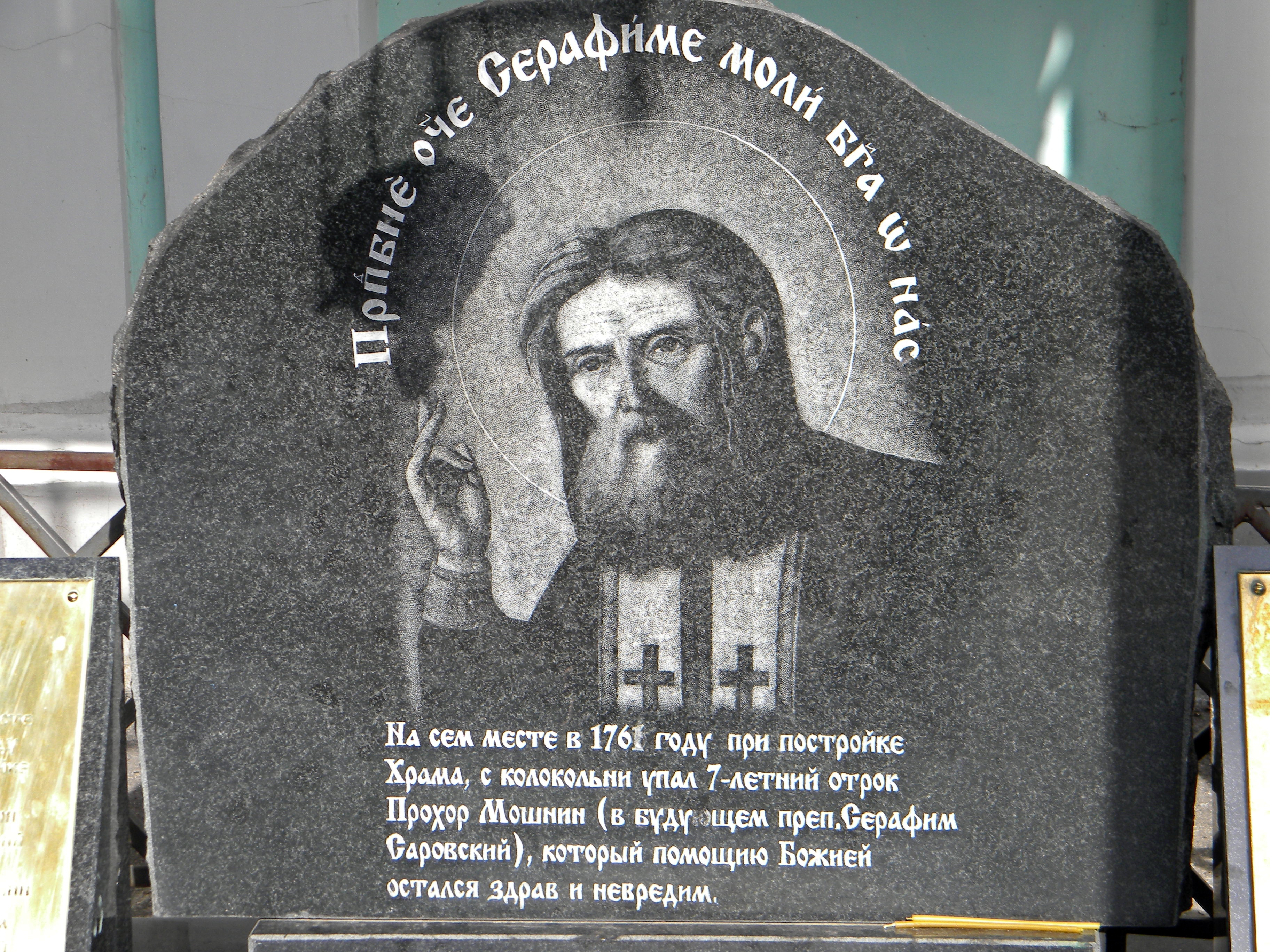 Сергиево-Казанский собор в г. Курске